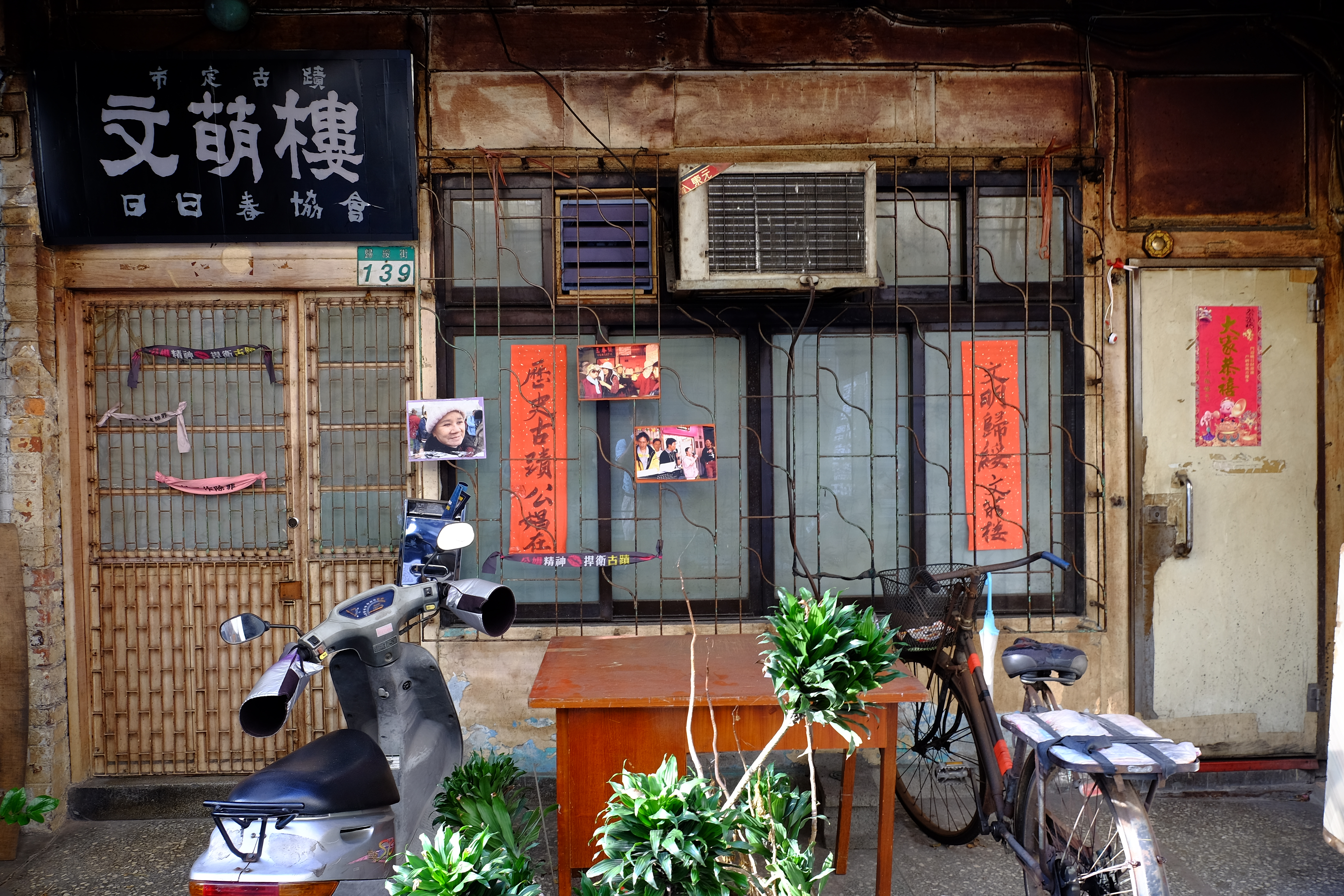 2016年歸綏街文萌樓